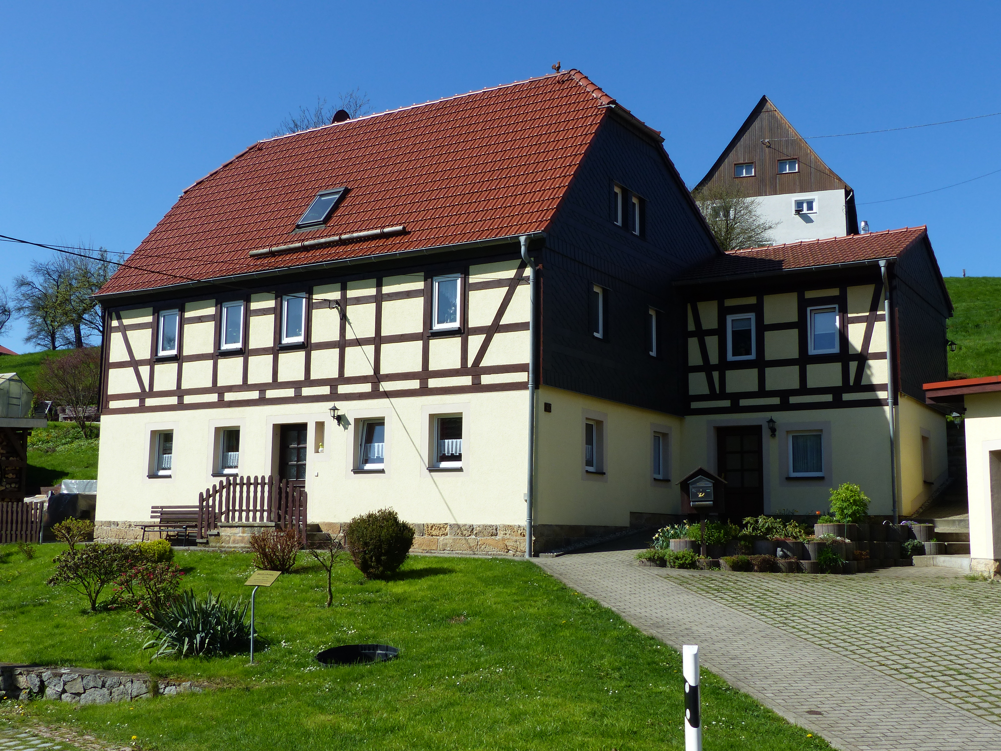 Denkmalgeschütztes Gebäude, Bergstraße 40, Goßdorf (Hohnstein)